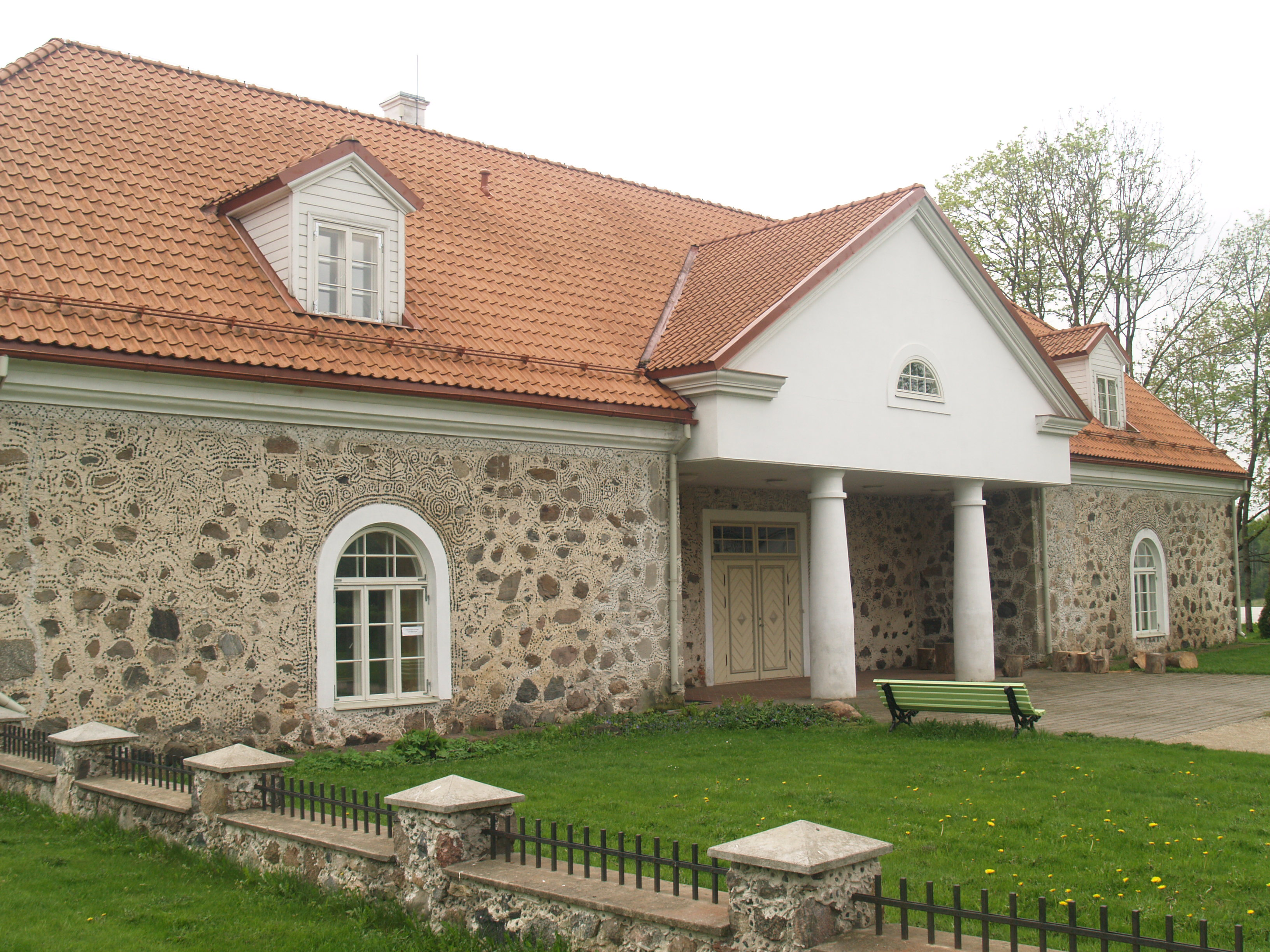 Vaimastvere mõisa ait Jõgeva vallas